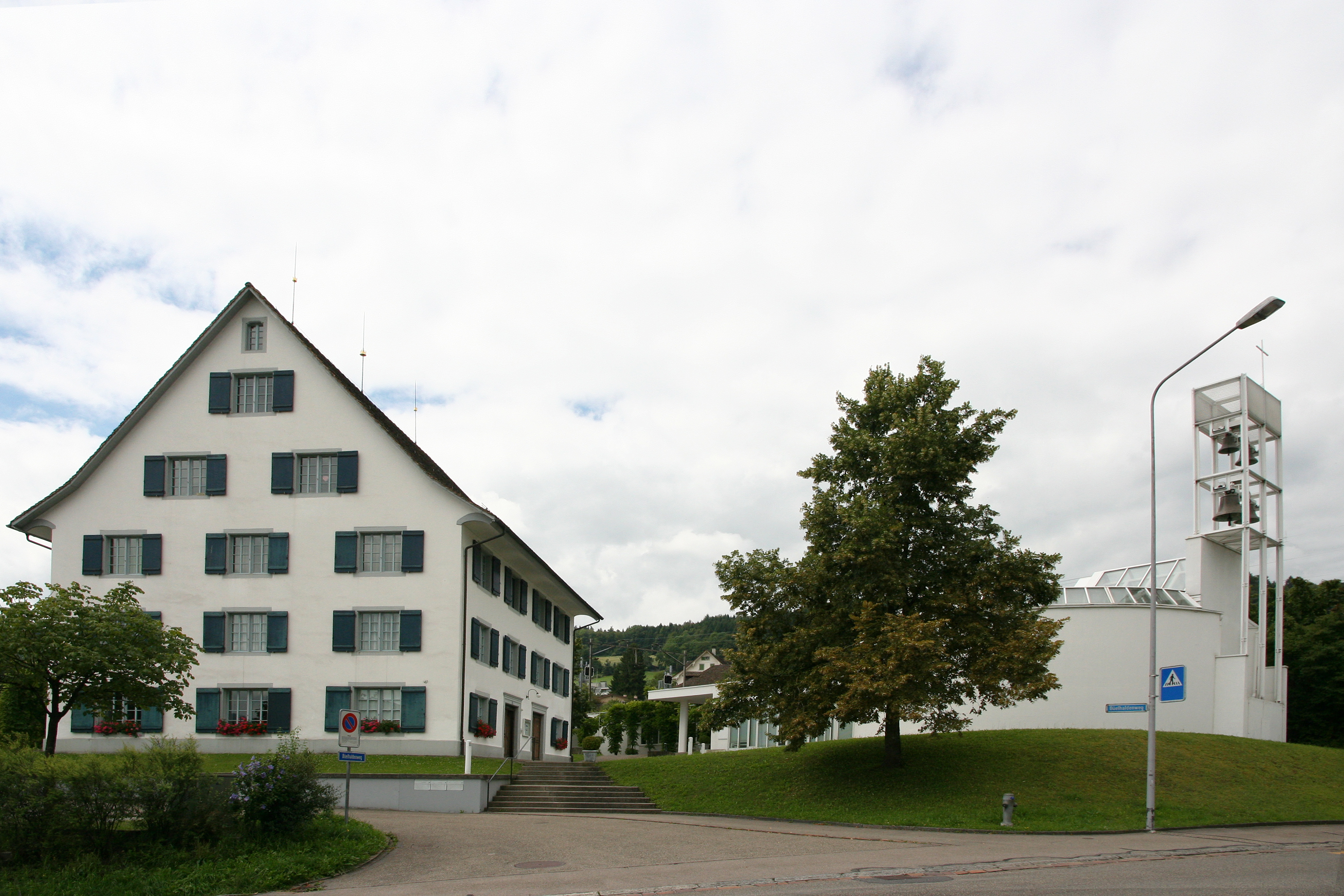 Römisch-katholische Kirche Heilig Chrüz Oberrieden ZH, Ansicht Nord